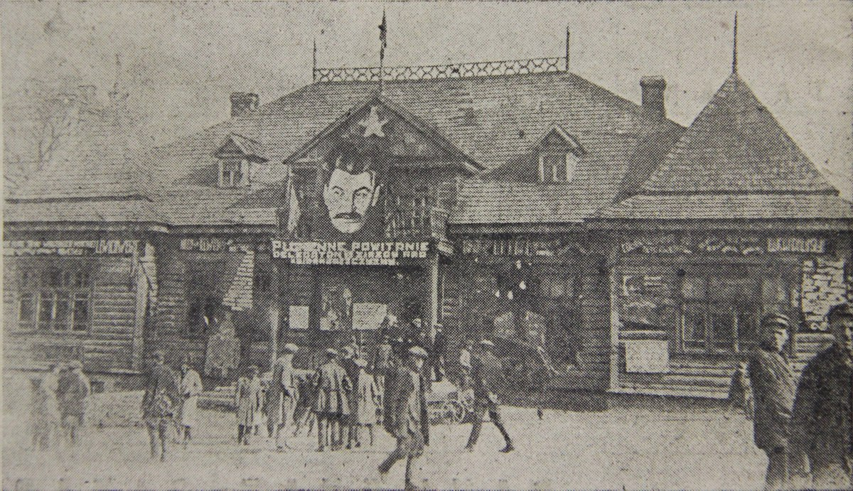 Беларуская (тарашкевіца): Койданаў (Kojdanaŭ), вуліца Станькаўская (vulica Stańkaŭskaja). Народны дом